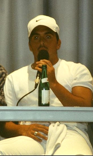 Cem Karaca 1997